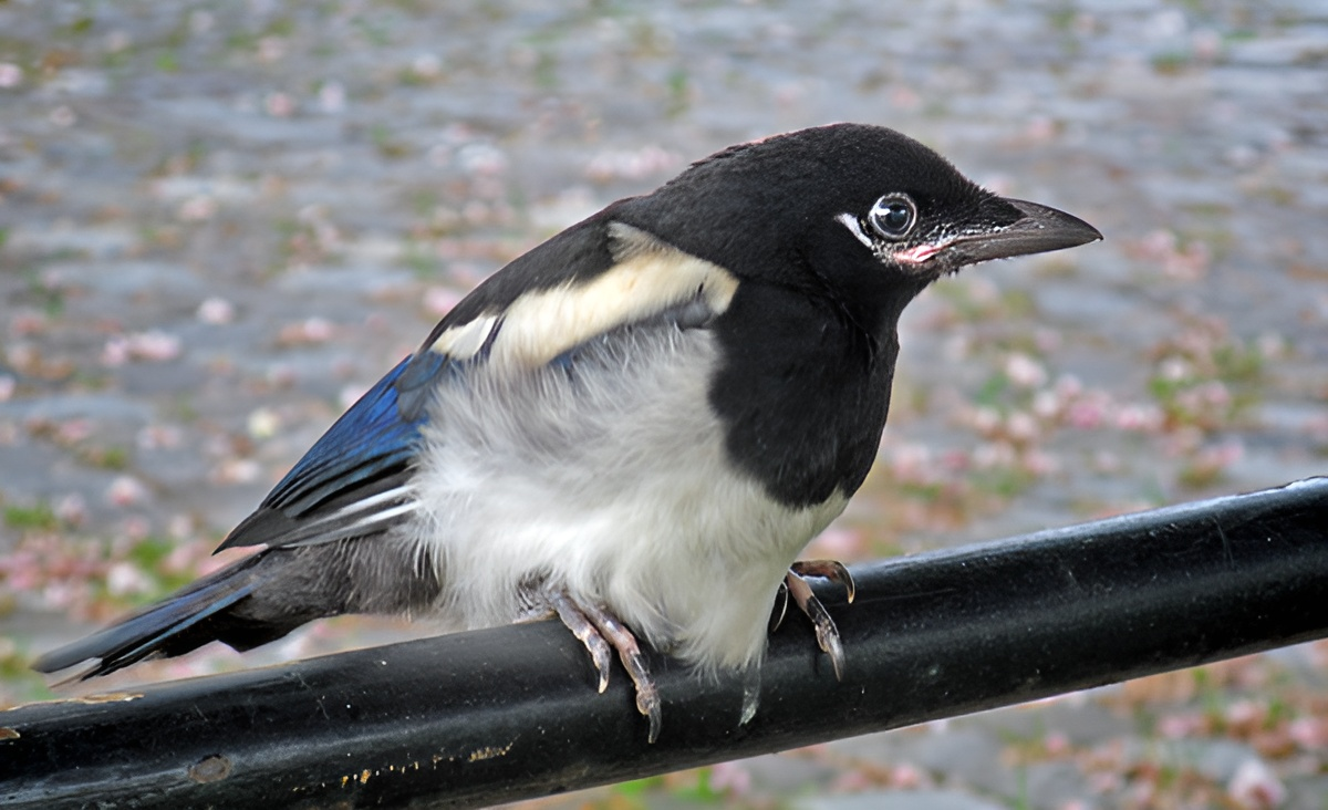 Skata - Pica pica ca 50 dagar gammal. Ystad 2011.